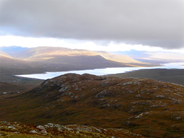 Шотландия, Грампианские горы, осень 2012